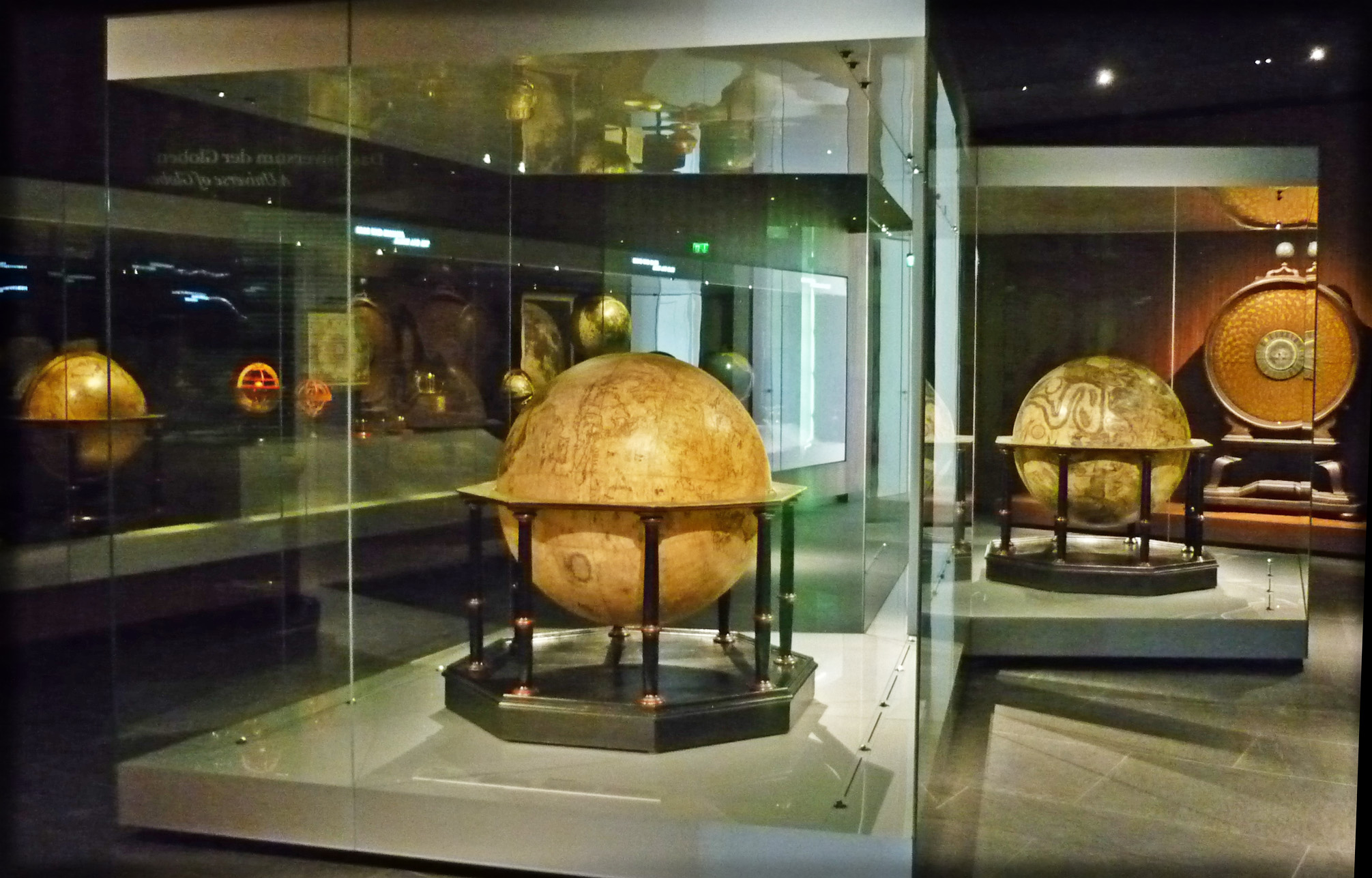 Mathematisch-Physikalischer Salon - Globenraum im Zwingerwall (im Zwinger in Dresden, nach der Neueröffnung im April 2013)